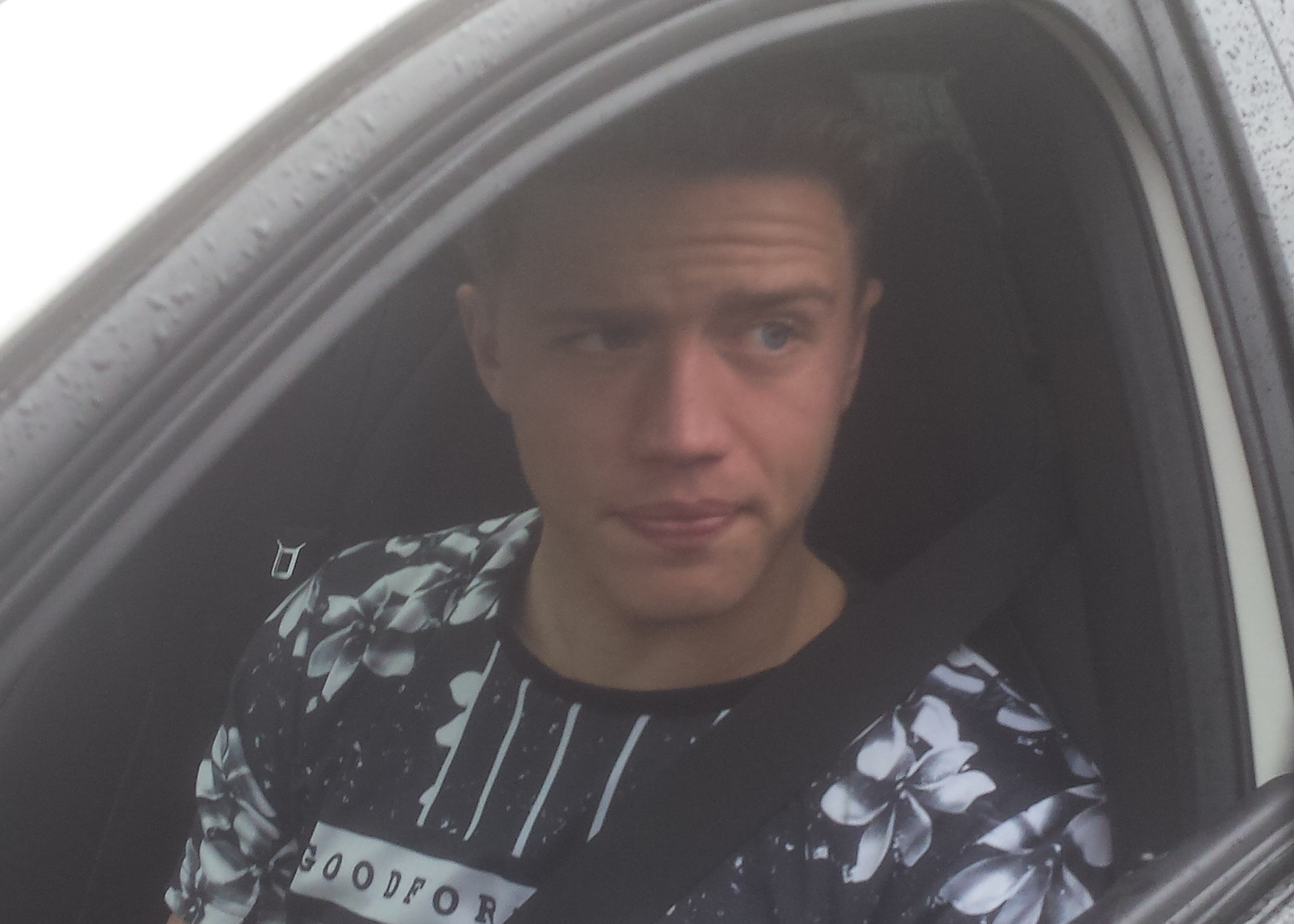 Baptiste Guillaume,dans sa voiture, après un entraînement public du Racing Club de Lens, le 14 mai 2015.